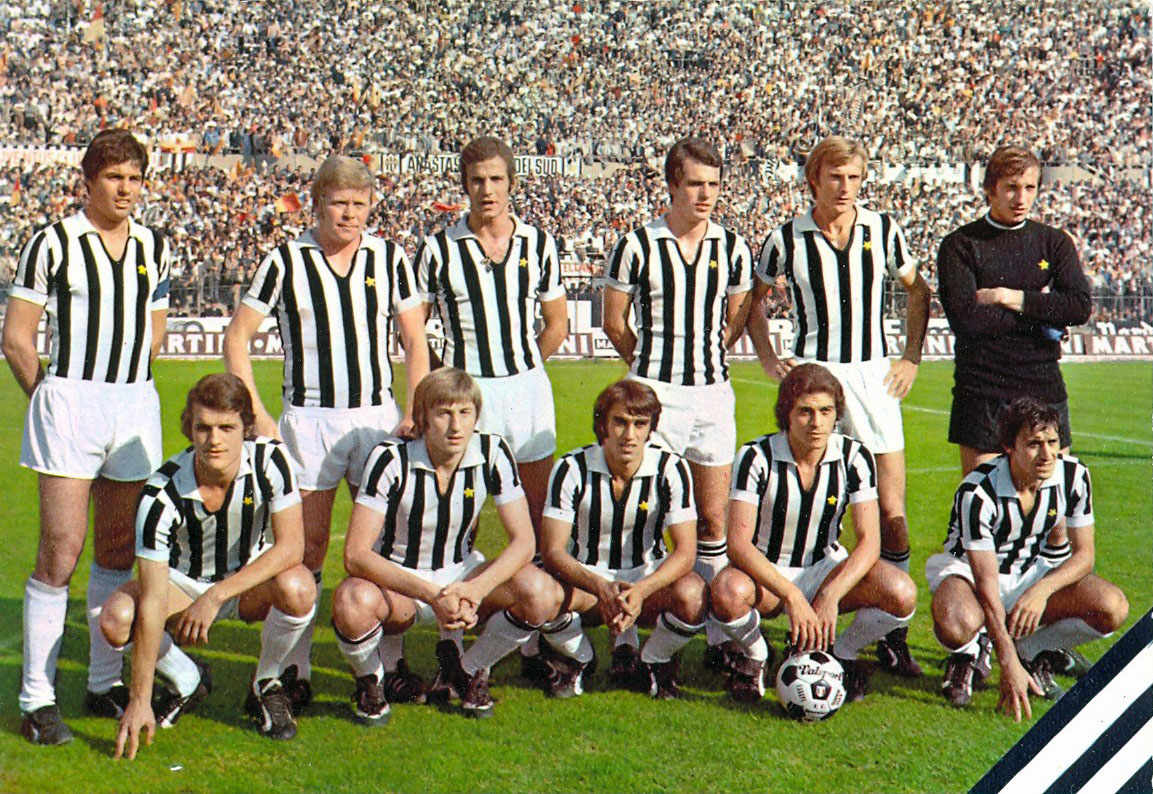 Una formazione della Juventus nella stagione 1971-72, in posa all'interno dello stadio Comunale di Torino. Da sinistra, in piedi: S. Salvadore (capitano), H. Haller, L. Spinosi, R. Bettega, F. Morini, P. Carmignani; accosciati: F. Capello, G. Marchetti, P. Anastasi, F. Causio, G. Furino.